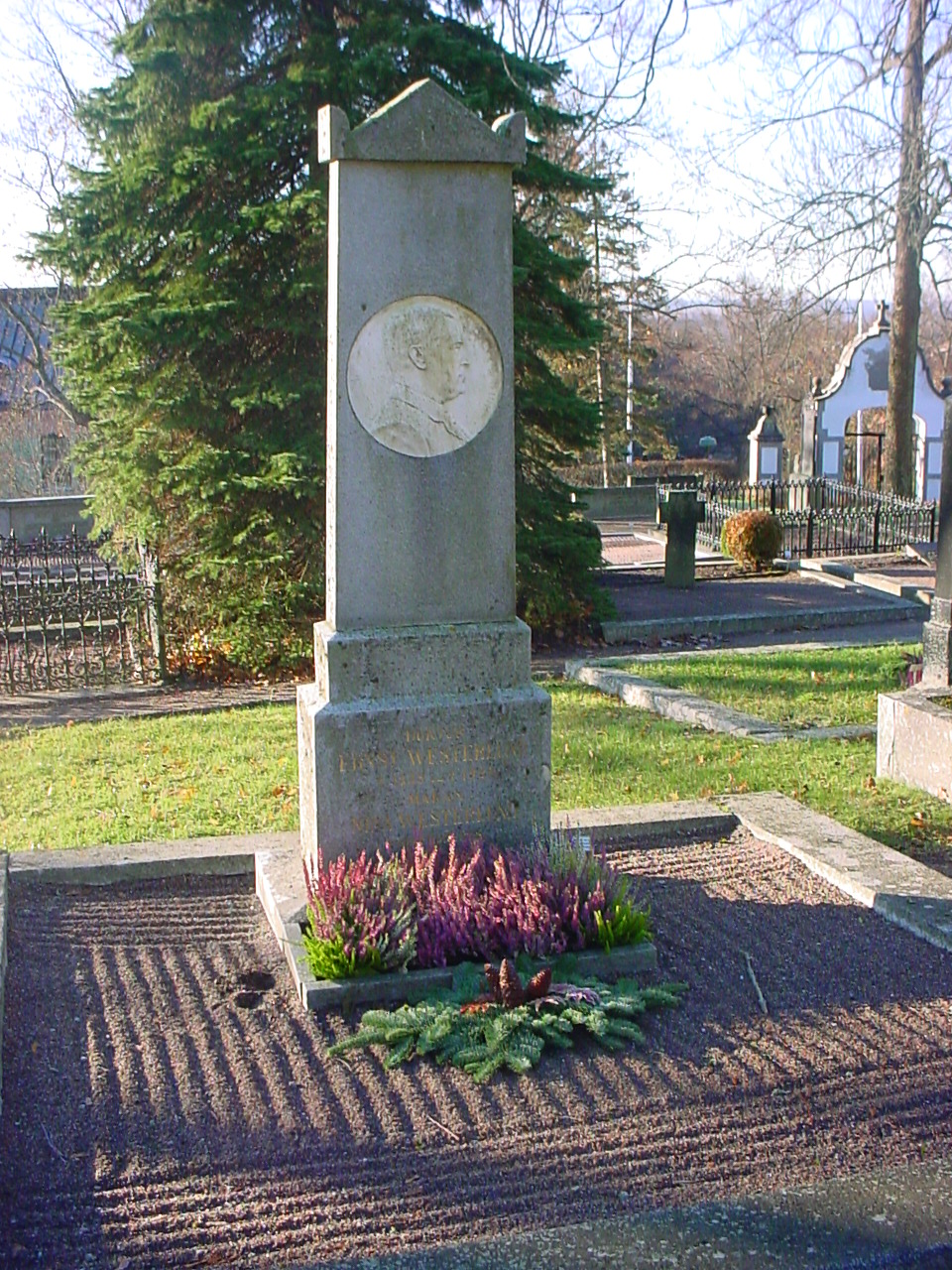 Enköping, Vårfrukyrkogården, gravvård tillhörande Dr Ernst Westerlund (1839-1924)